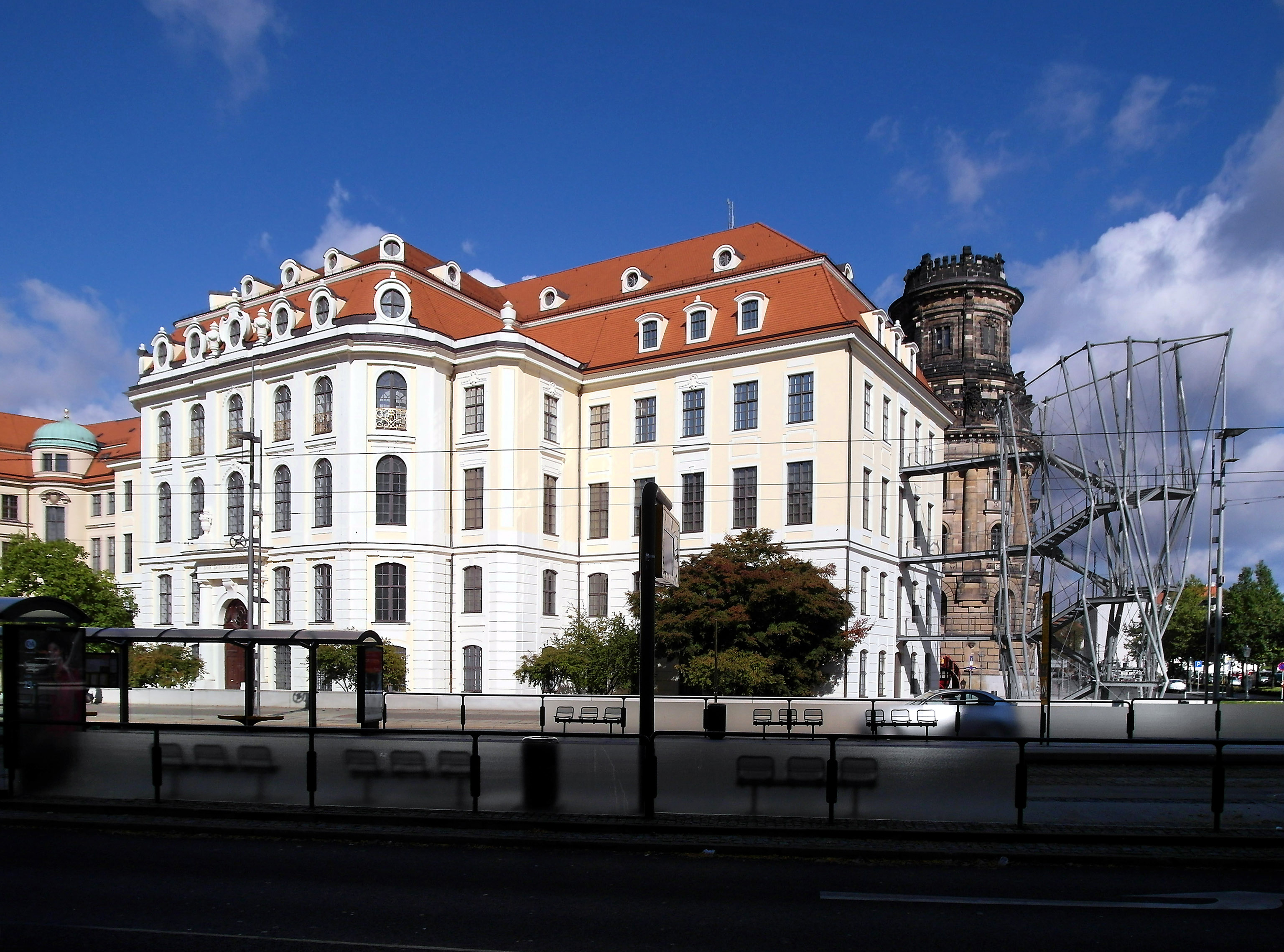 07.10.2012 01067 Dresden-Altstadt, Wilsdruffer Straße: Altes Landhaus, frühklassizistisch (1770-1776 von F. A. Krubsacius). Heute Museum für Stadtgeschichte. Postmoderne Feuertreppe 2005/06 (Architekt Rolf Klinkenbusch). Rechts das Polizeipräsidium. Das Gebäude für die Königliche Polizeidirektion wurde 1895-1900 nach Plänen des Architekten Julius Temper errichtet. [SAM1062]20121007015DR.JPG(c)Blobelt